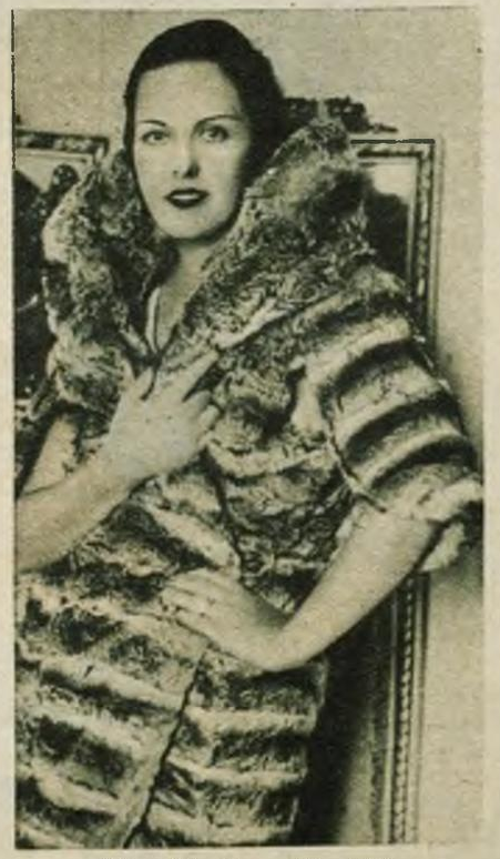 Arlette Stavisky (née Simon), femme d'Alexandre Stavisky.